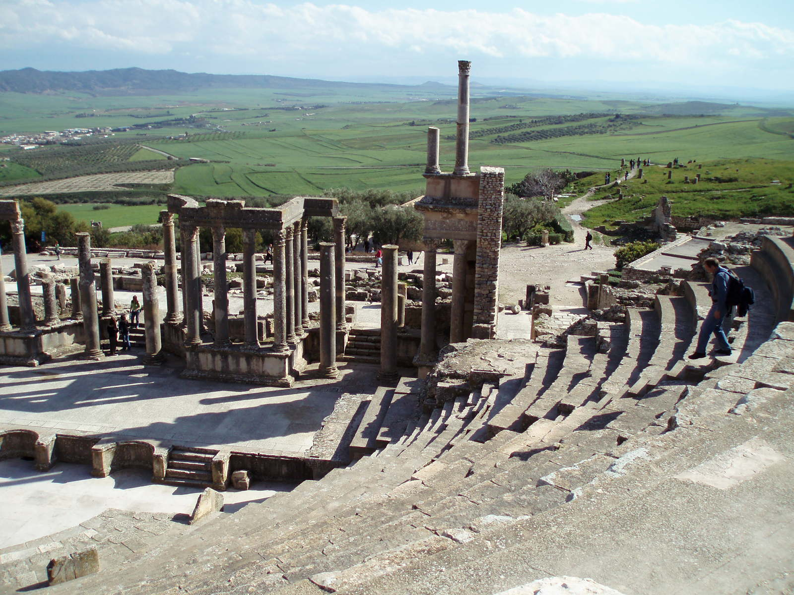 Anfiteatro romano de la antigua ciudad de Dougga, en Túnez.North Africa 2007 020 Dougga